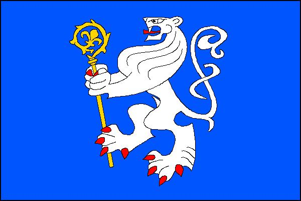 Vlajka obce Všechovice v okrese Brno-venkov